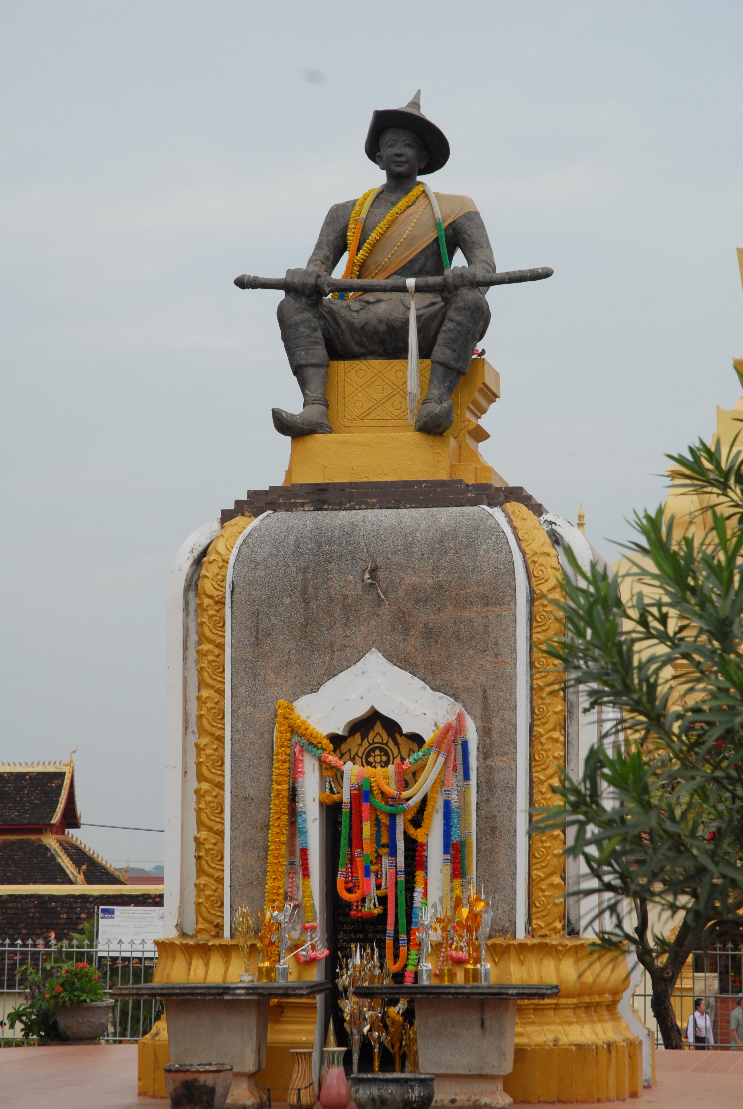 Vientiane : monument au roi Setthathirat, devant le Pha That Luang